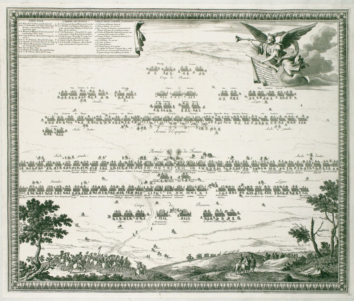 Kupferstich der Schlacht bei Rethel (1650) von Sebastian Beaulieu. Originalbeschreibung: La bataille de Rethel, gagnée par l'armée du Roy, commandée par le Marechal du Plessis-Praslin sur l'armée d'Espag., commandée par le Vicomte de Turenne au mois de decembre 1650. Schlachtaufstellung der spanischen und der französischen Armeen aus der Vogelschau mit Namen der Kommandeure und Regimenter mit Legende. Aus: Sebastian Beaulieu: “Les glorieuses conquestes de Louis le Grand roy de France et de Navarre. Blatt 64. Paris 1698”